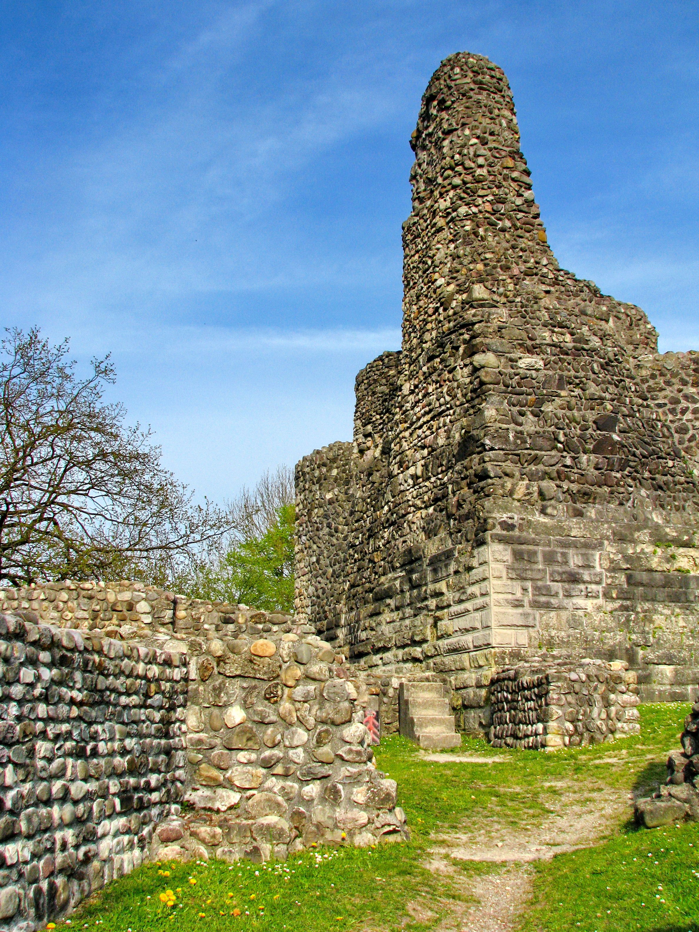 Altburg (Alt-Regensberg) in Regensdorf (ZH)